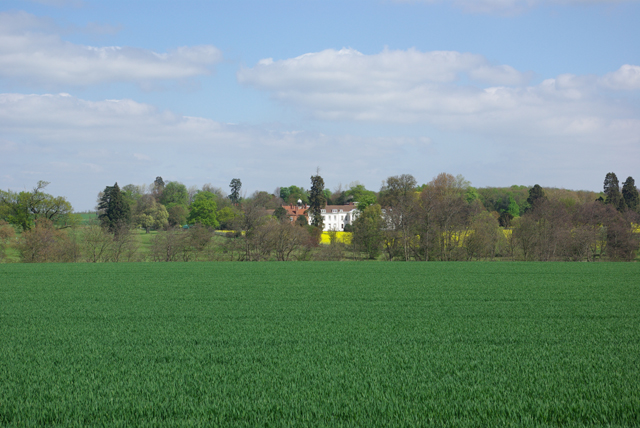 Gosfield Hall